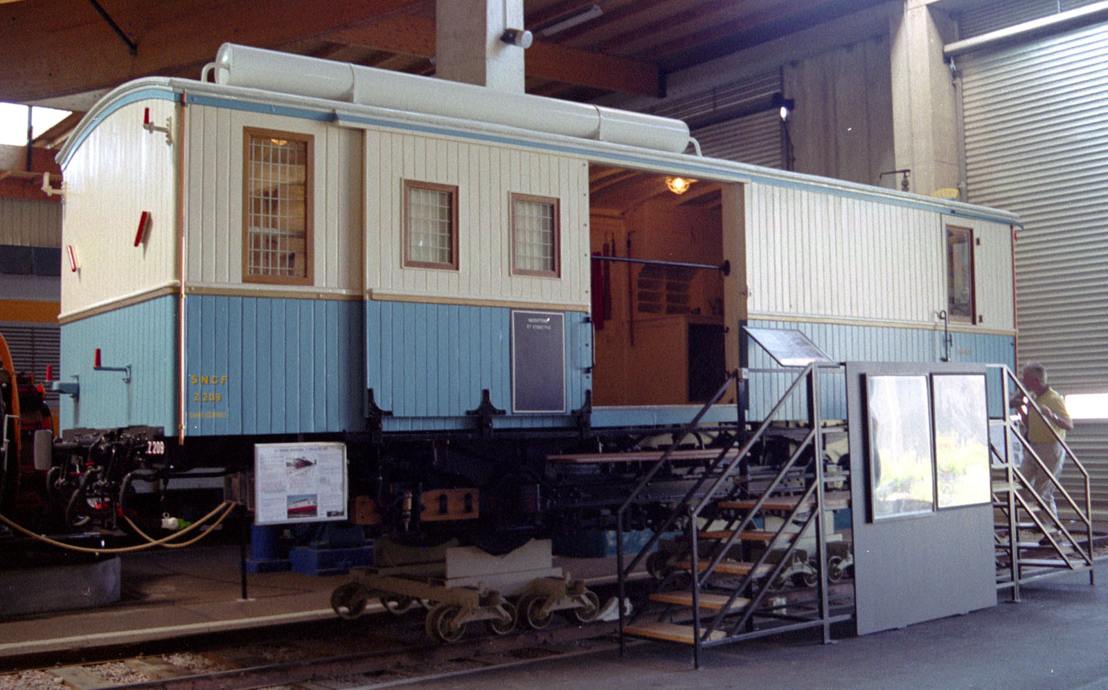 Automotrice Z 209 de la ligne Saint-Gervais-Vallorcine prise au musée du chemin de fer à Mulhouse. SNCF Z 209 train taken in the railway museum of Mulhouse.